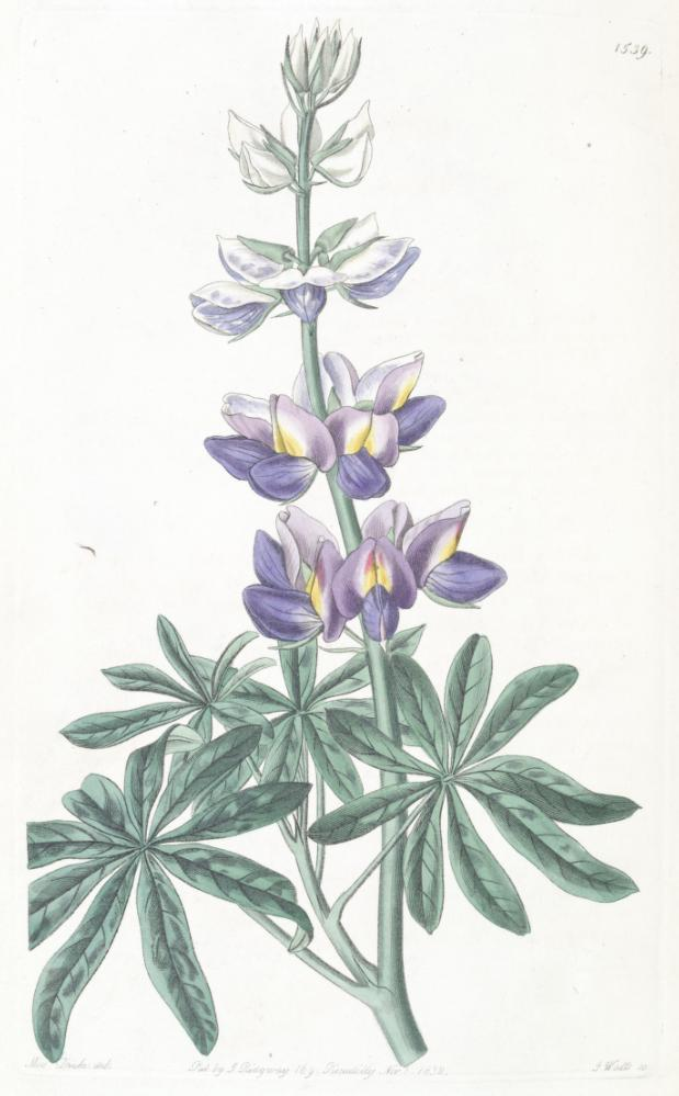 Illustration of Lupinus mutabilis